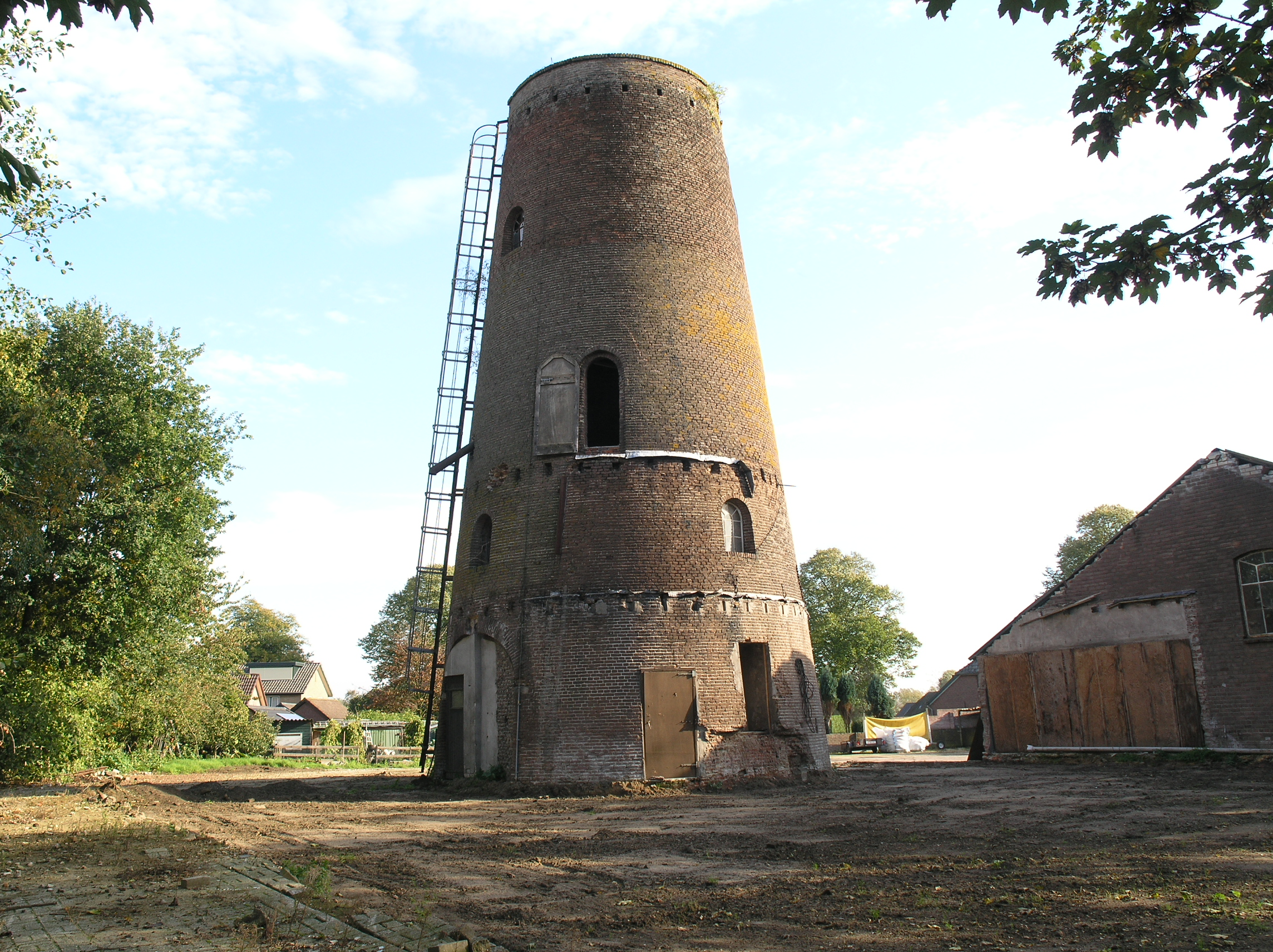 Keijenborg De Hoop Molenrestant